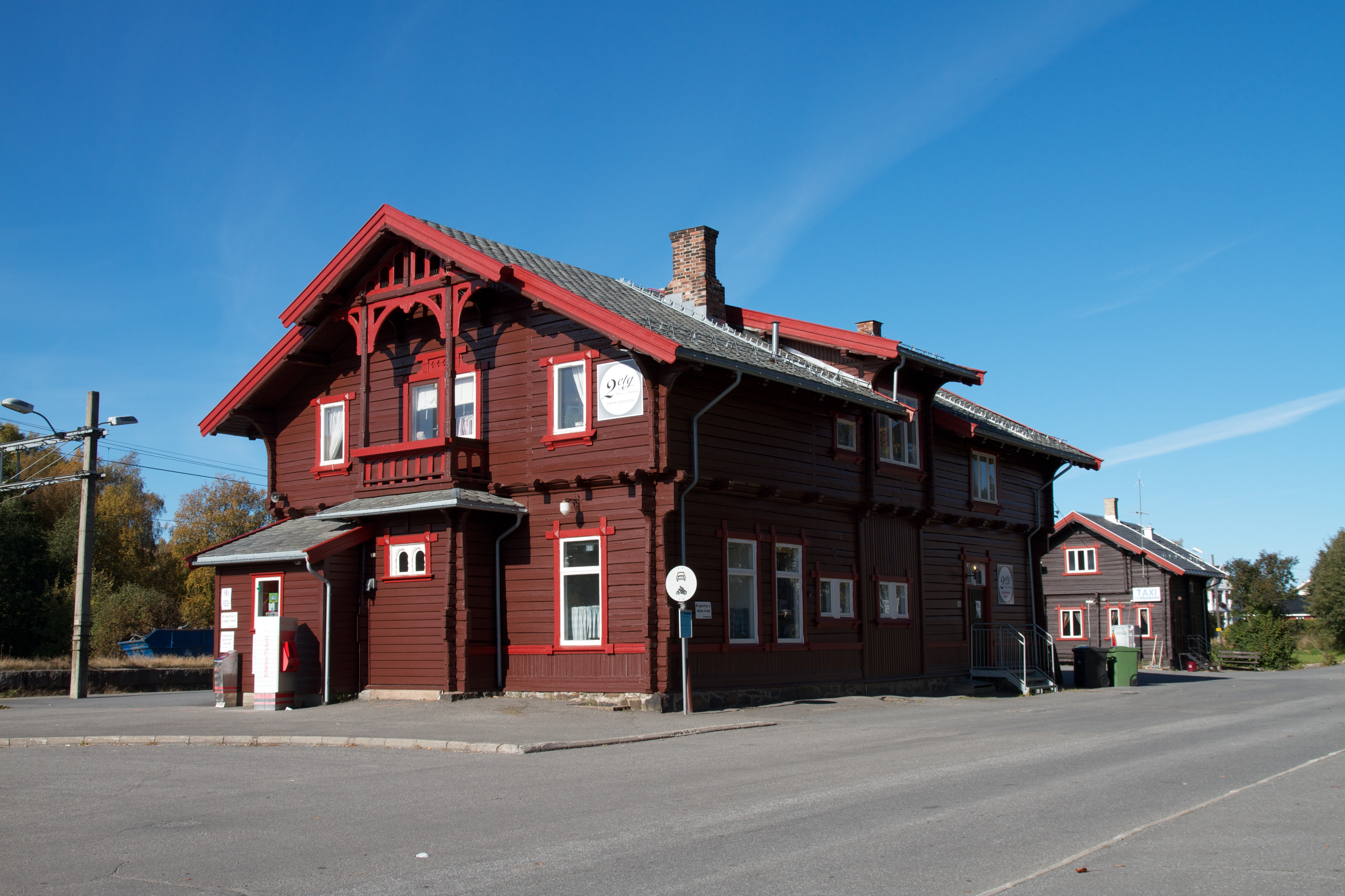 Gran stasjon i Oppland.